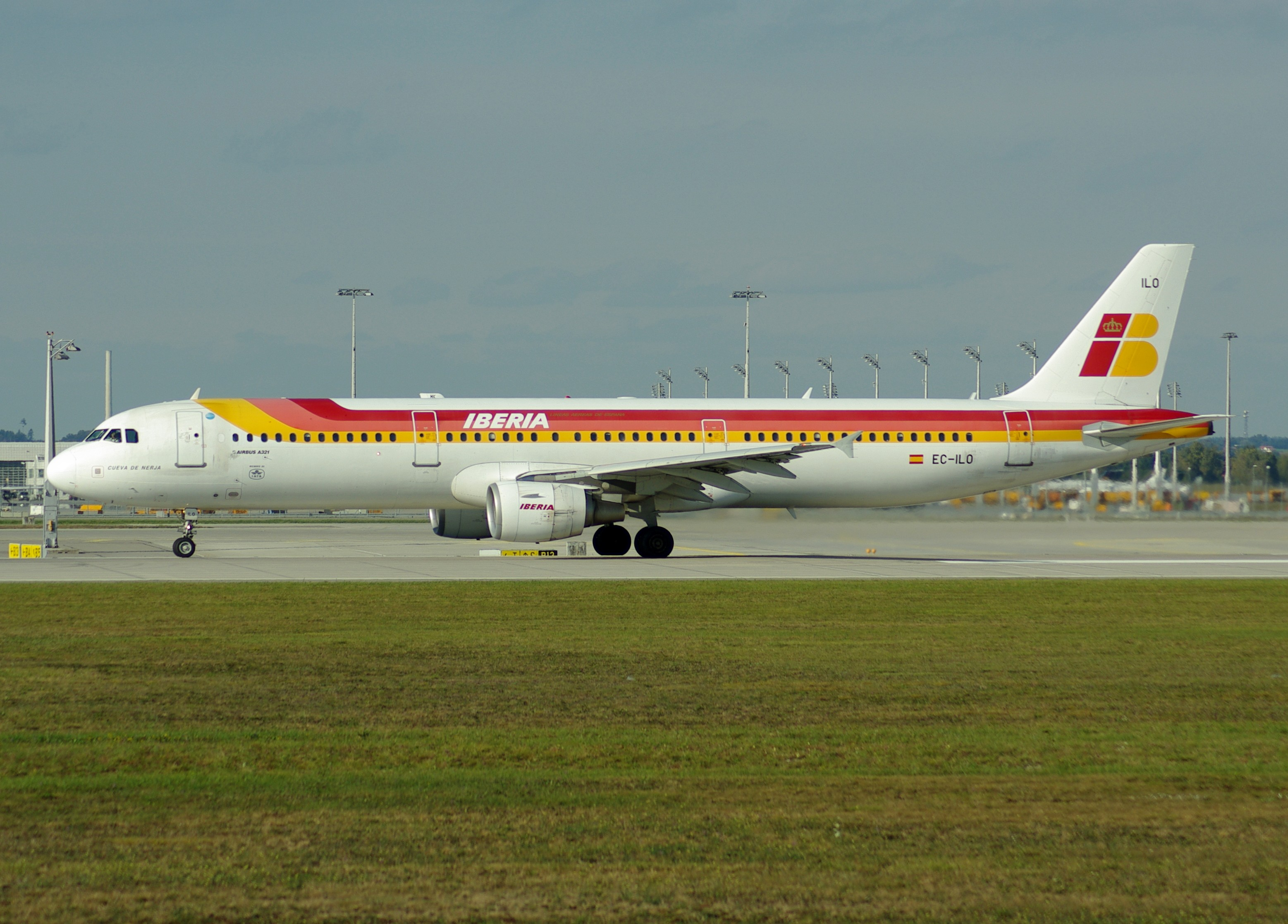 Iberia Airbus A321-211 (EC-ILO) at MUC.